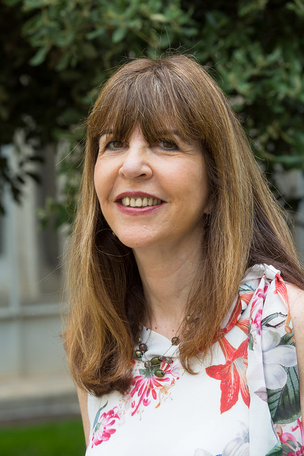 hispanista y cervantista argentina radicada en Israel que ostenta la cátedra Salomon & Victoria Cohen en América Latina Contemporánea en la Universidad Hebrea de Jerusalén